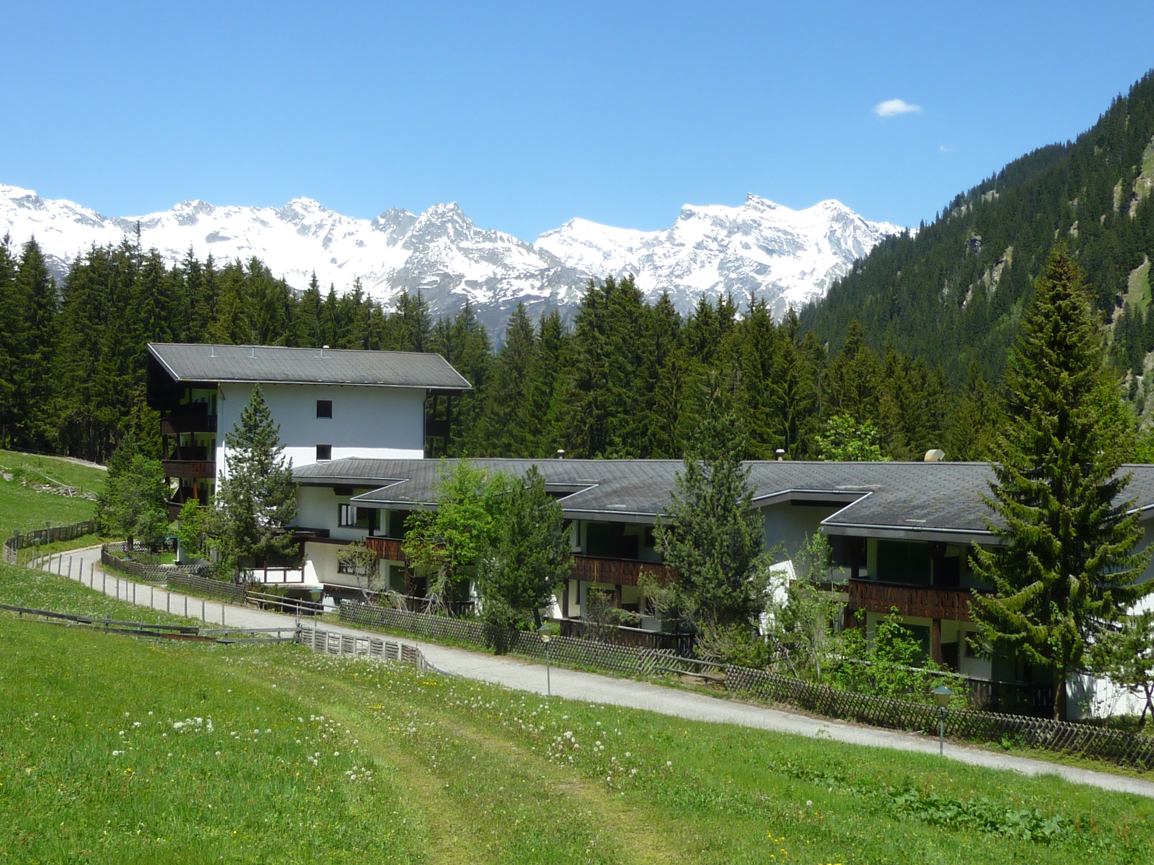 ehemaliges Hotel Tenigerbad, Standort der Dépendance